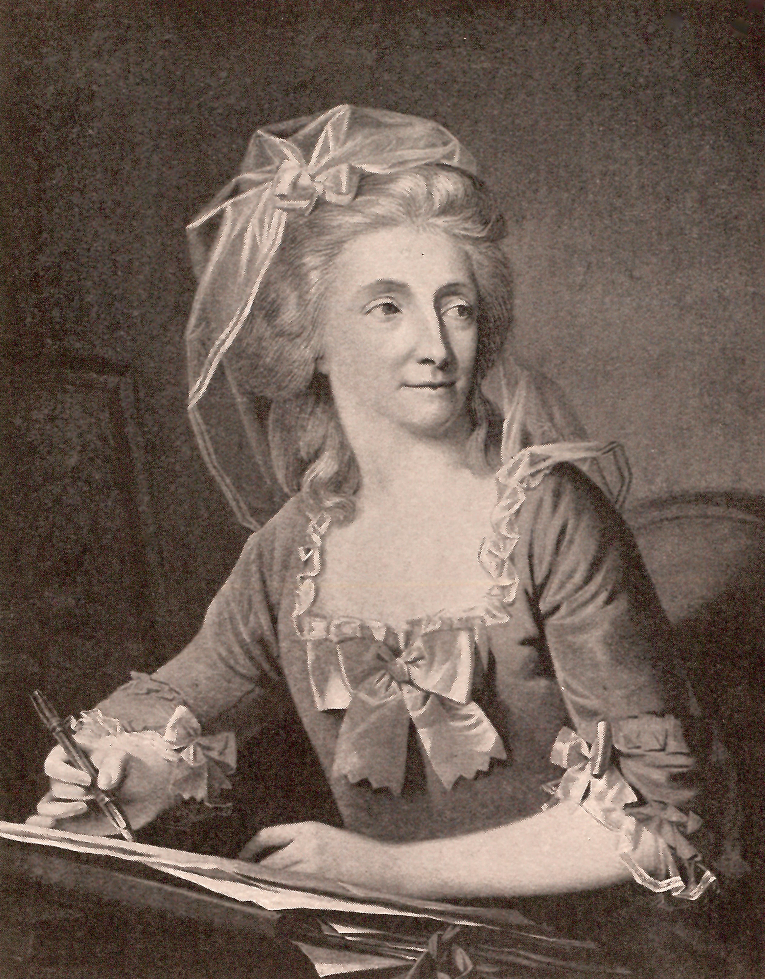 Kammerraadinde Magdalene Margrethe Bärens, C. A. Lorentzen pinx 1786